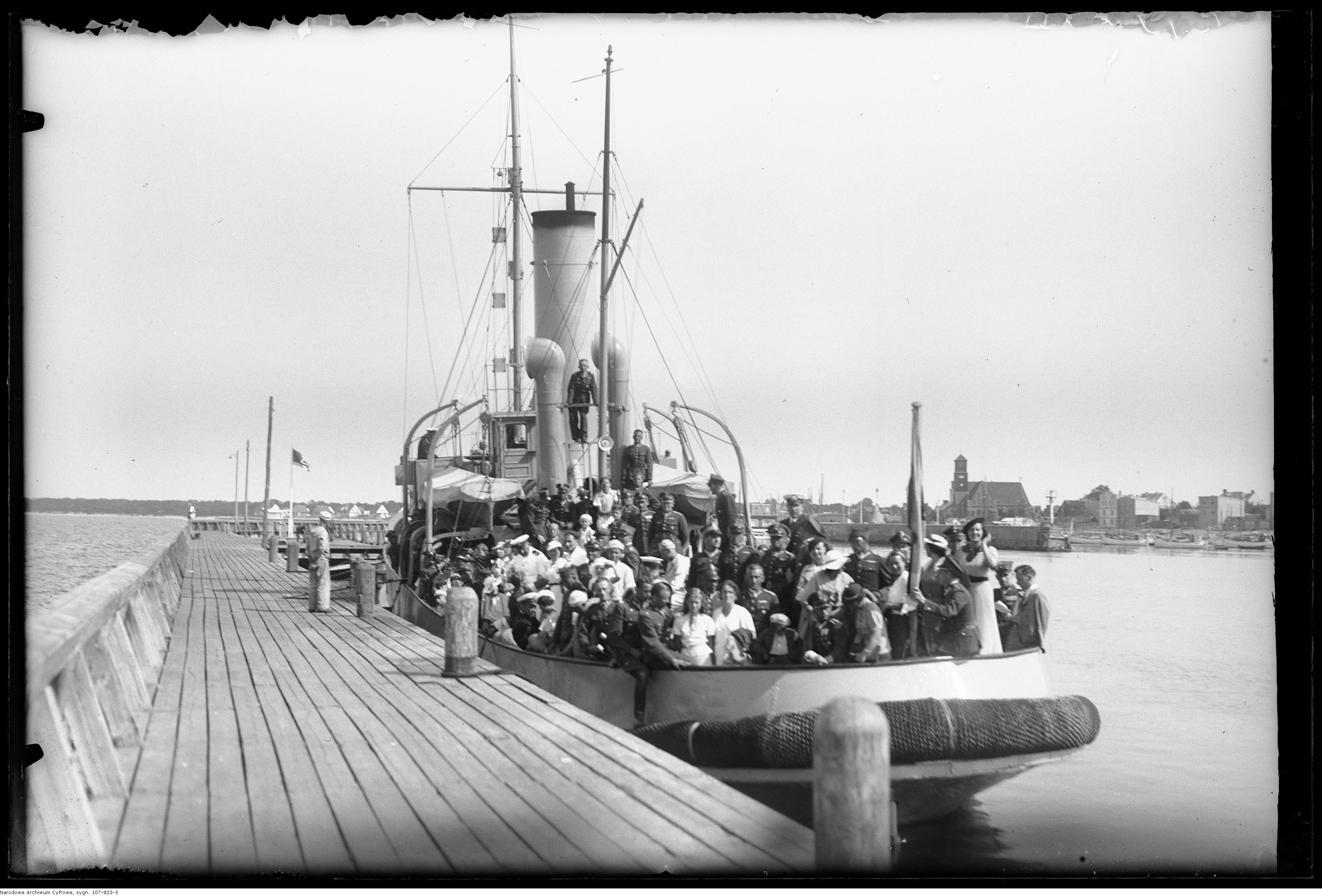 Wojskowi, marynarze i kobiety na holowniku "Lech" w porcie.